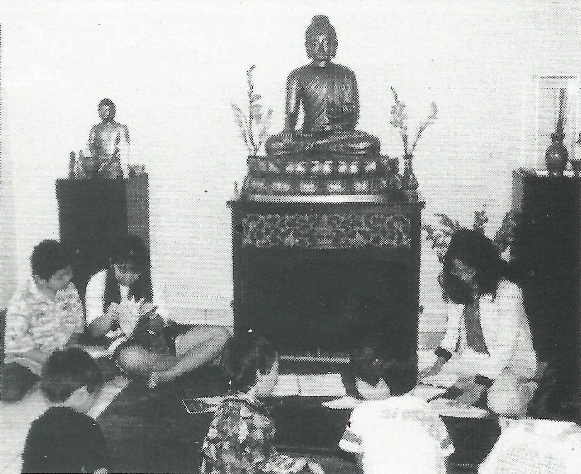 Keceriaan Taman Putra di hari Minggu, membina tunas masa depan.